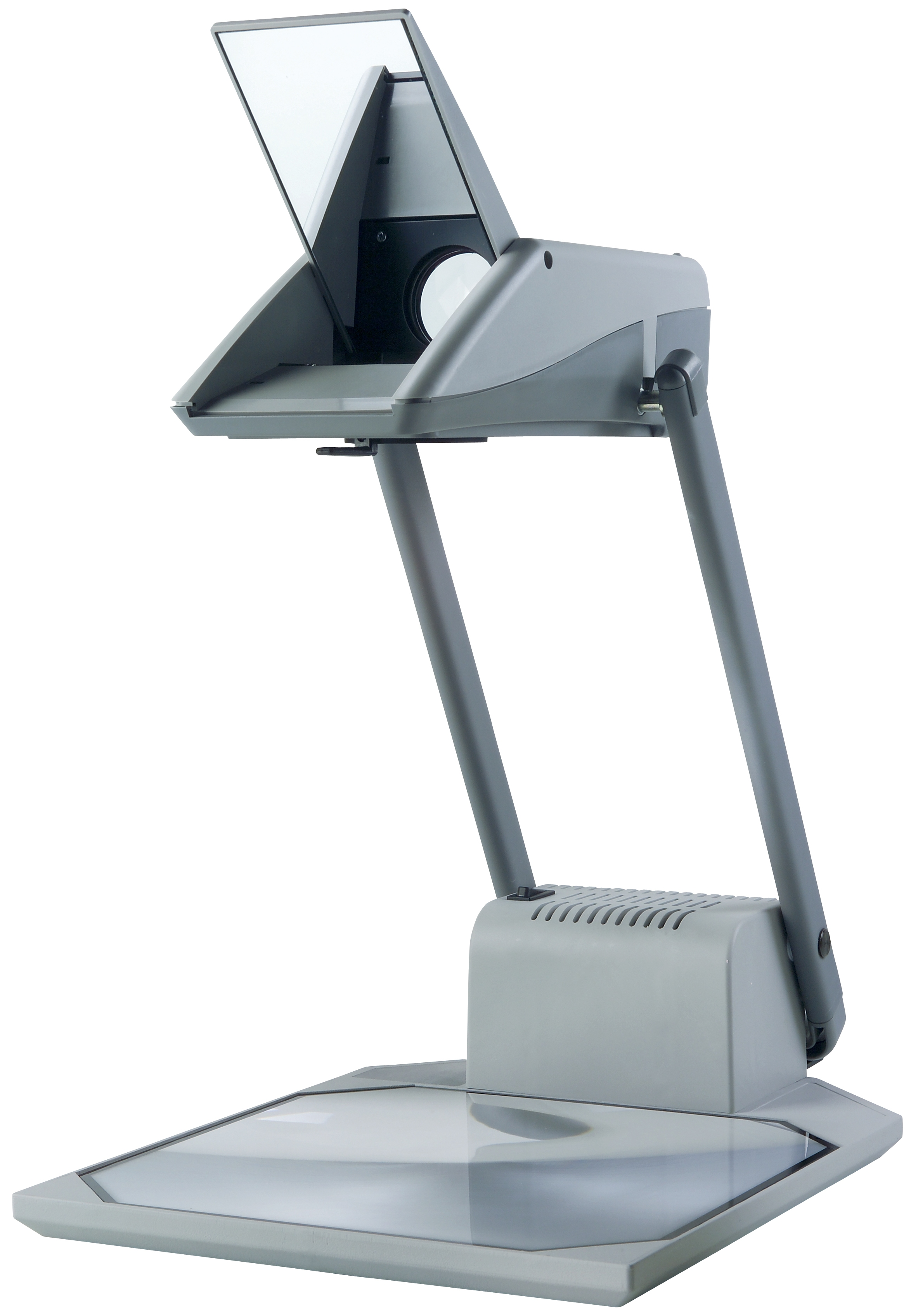 Slika prikazuje primer zrcalnega grafoskopa